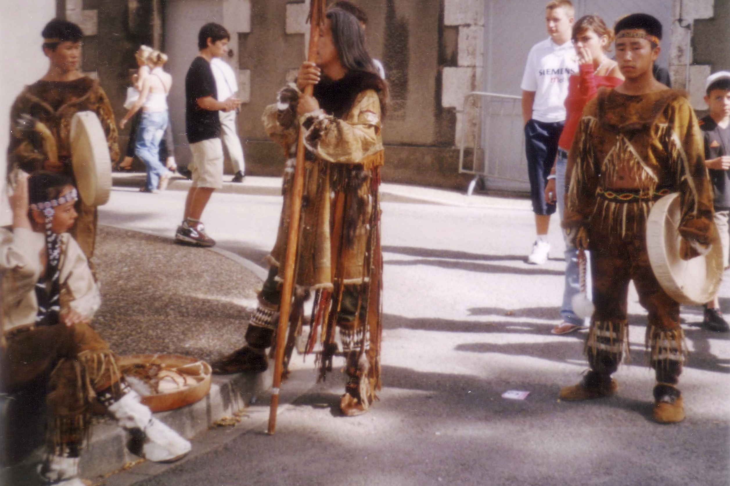 Festival de Confolens 2005 - danseurs Tchouktchen de Sibérie, ensemble Ergyron (République des Tchouktches, Fédération de Russie)